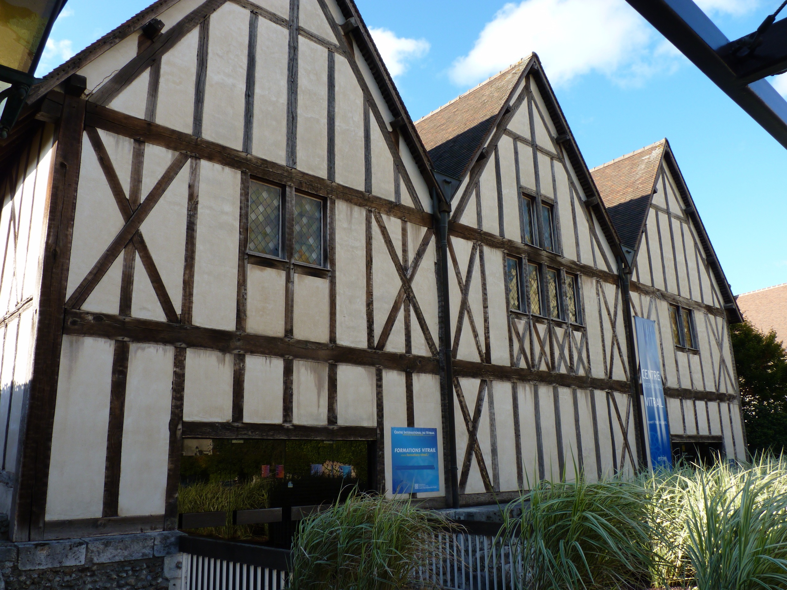 Cellier de Loëns 3 rue du Cardinal Pie à Chartres